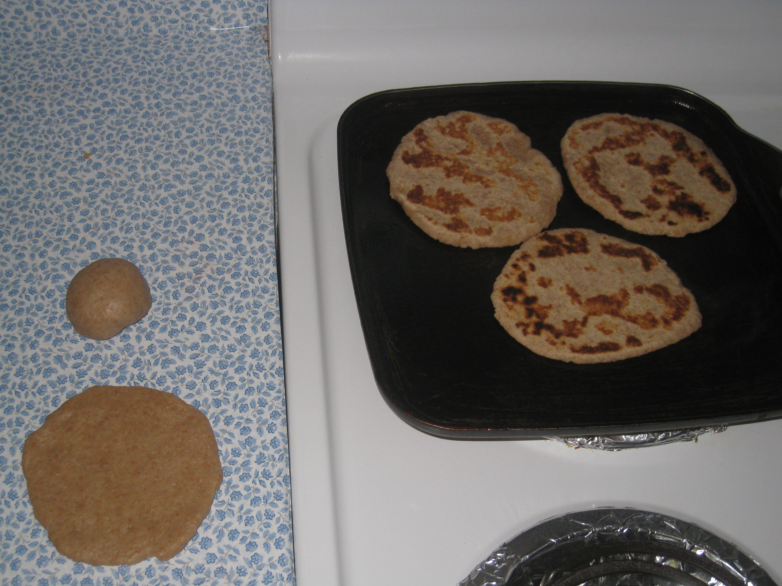 Mexican gorditas de azucar (sugar gorditas)